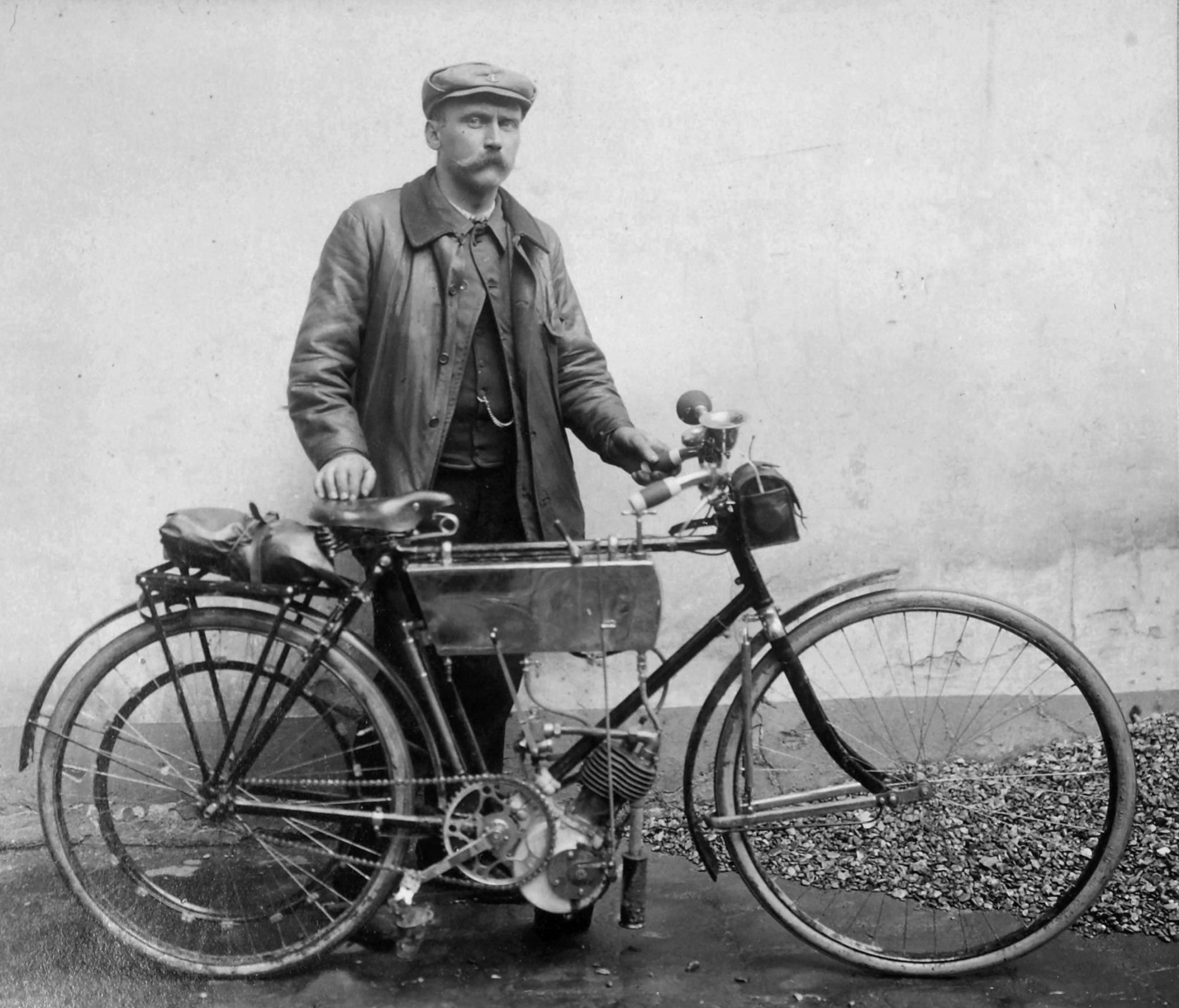 Faivre sur motocyclette Terrot de 220 ccm